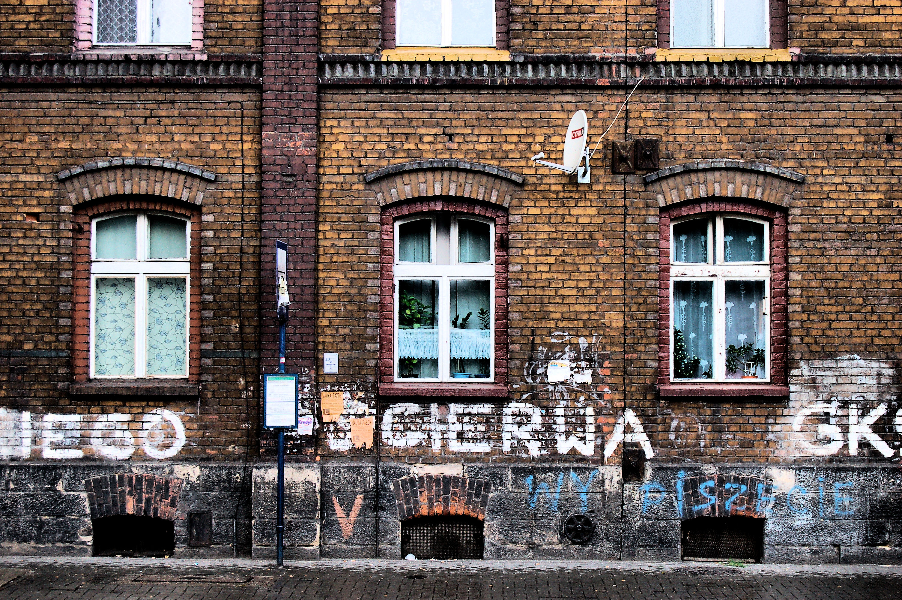 Katowice Załęże - ulica Wiśniowa. Katowice Zaleze - Wisniowa St.